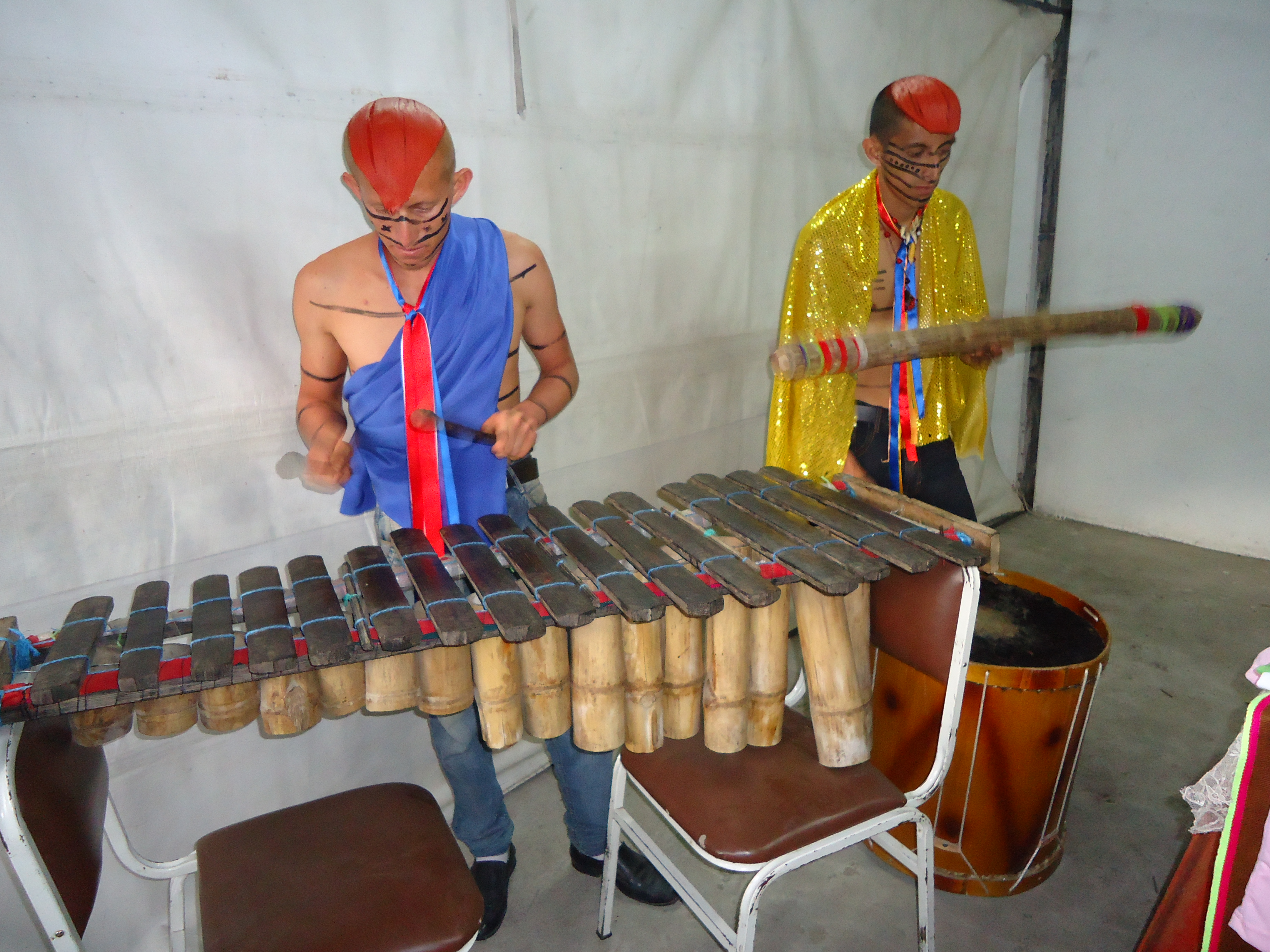 Indígenas tsáchilas, tocando instrumentos tradicionales